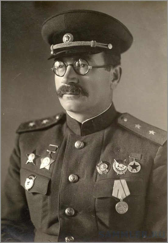 Ротмистров П.А.